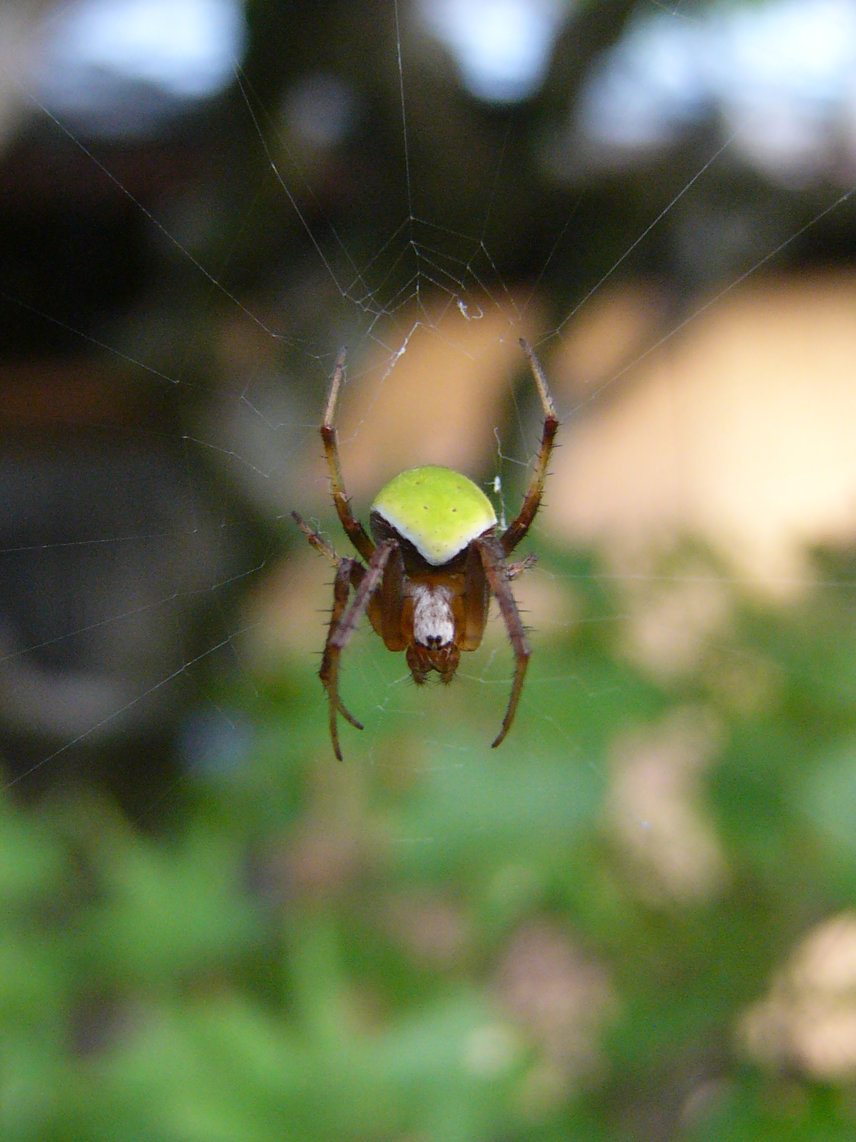 2011年8月15日篠山市にて撮影。夕方になり網をせっせと張っていたが手際よく完成させて満足そうに網の中央に鎮座した。網も姿も美しいクモだ。